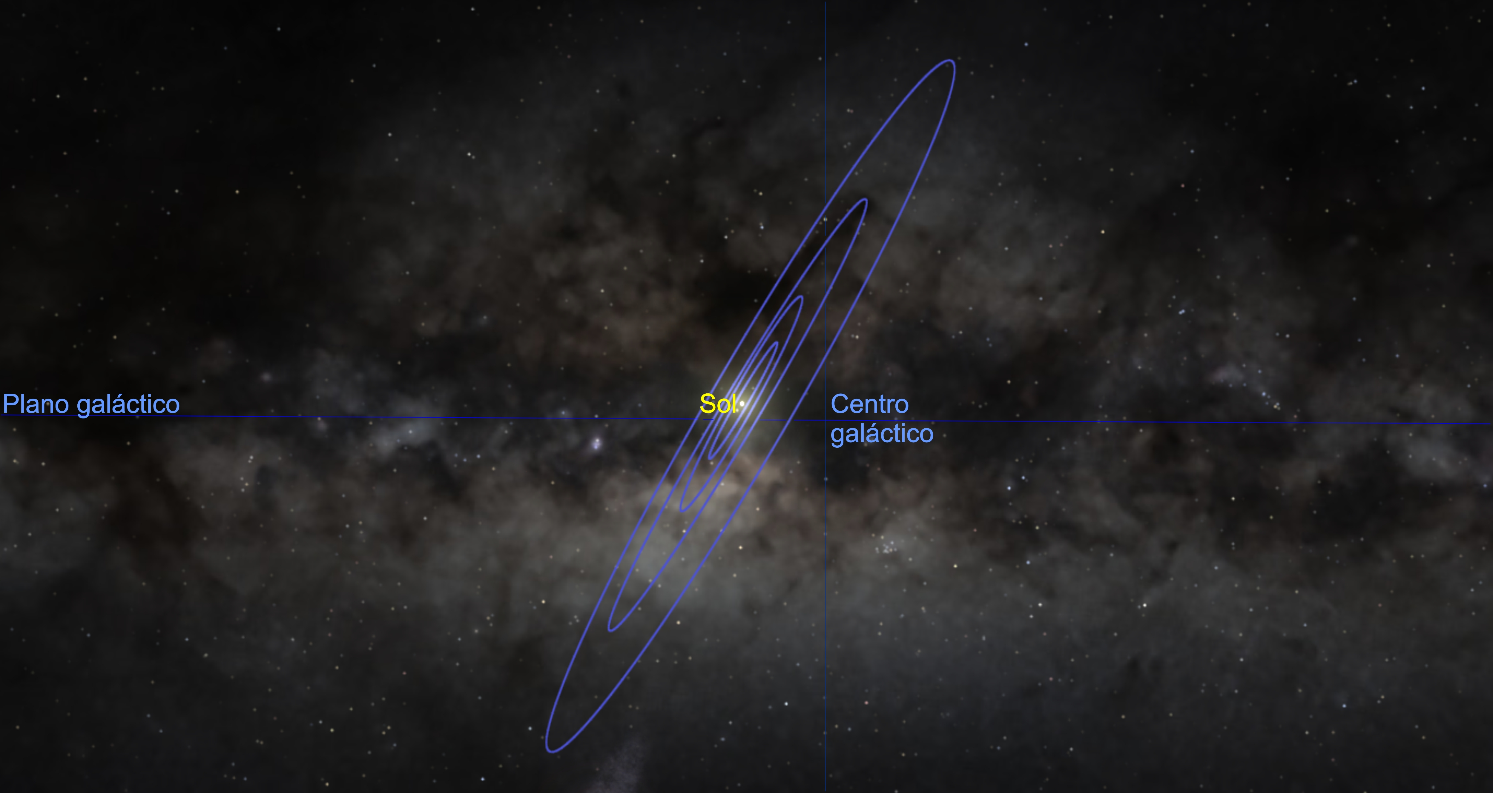 Este diagrama mostra a inclinação do plano do Sistema Solar em relação ao plano galáctico. Esta ilustração foi criada com base no software livre Celestia.